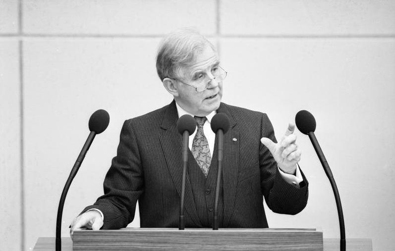 Bonn, 14.12.1990 In der ersten Sitzung des gesamtdeutschen Bundesrates in Bonn traf die Länderkammer die Entscheidung, die Beamtenbesoldung in den neuen Bundesländern für den Bereich der leitenden Beamten zu verbessern. Die neuen Bundesländer sollen ermächtigt werden, die im Einigungsvertrag vorgesehenen 35% eines entsprechenden westdeutschen Gehaltes durch einen nicht ruhegehaltsfähigen Zuschuß von 14% aufzustocken. Die Entscheidung des Bundesrates muß durch die Bundesregierung in Kraft gesetzt werden.